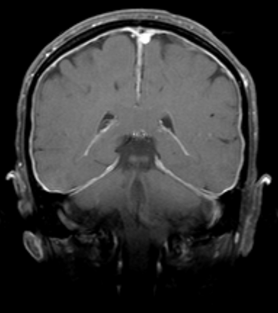 Magnetresonanztomographie des Kopfes (T1w mit Kontrastmittel, coronar) bei Liquorunterdrucksyndrom nach PDA. Typisch ist die starke Signalintensität der Meningen nach Kontrastmittel.